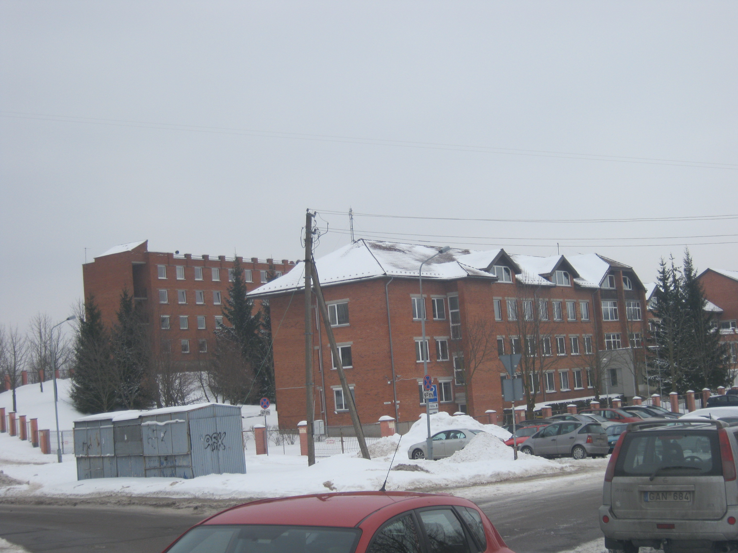 Lietuvos kariuomenės jungtinis štabas ir karo policijos Vilniaus įgūla